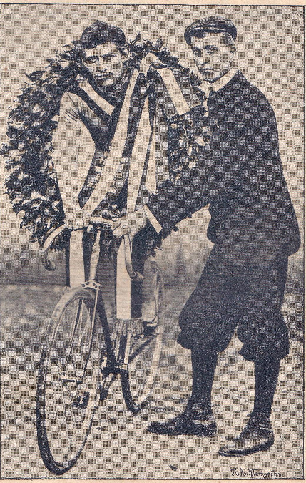 Willy Arend mit dem Siegerkranz vom Großen Preis von Deutschland, 1898